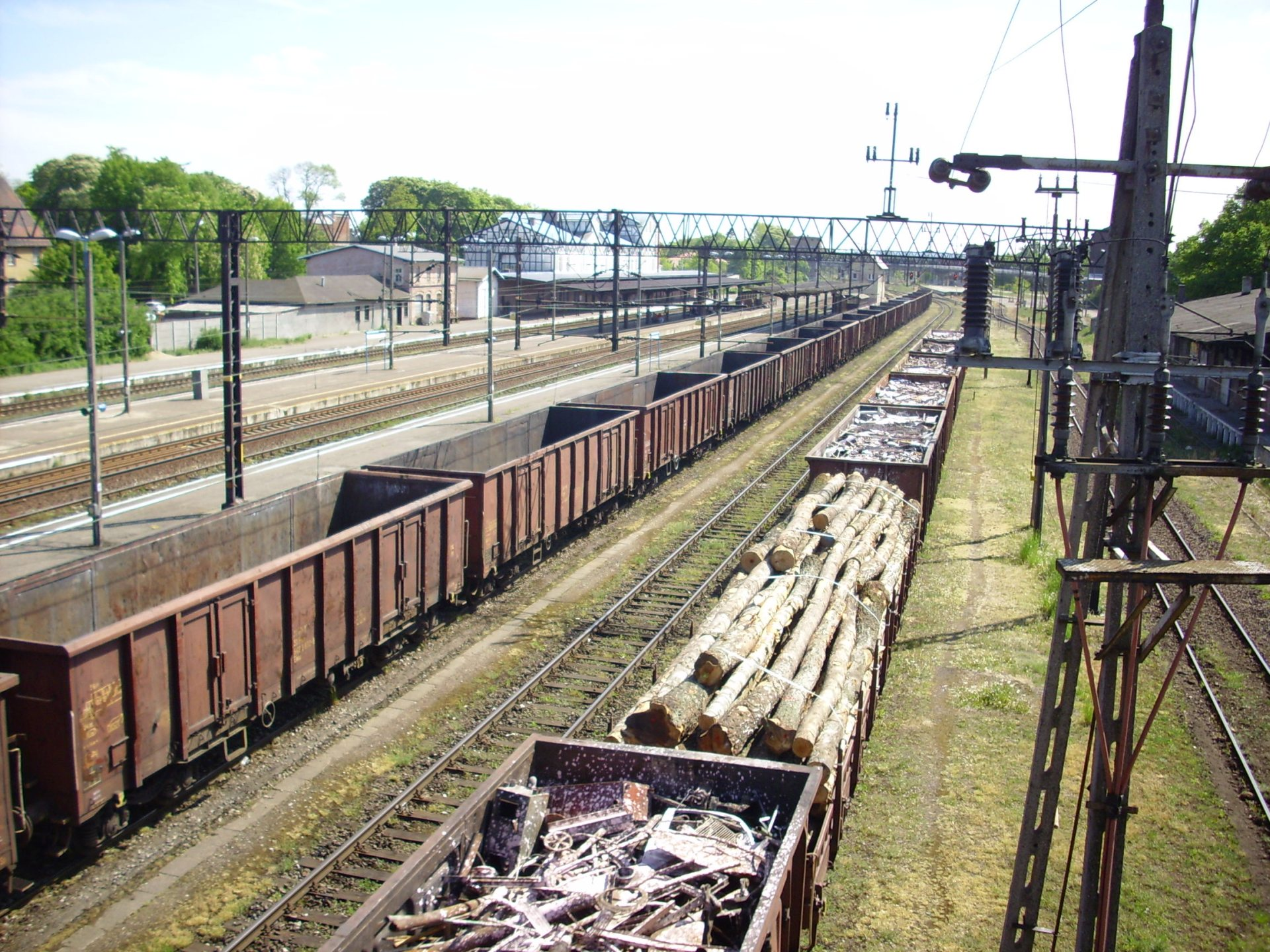 Dworzec kolejowy w Białogardzie. Widok z kładki dla pieszych.